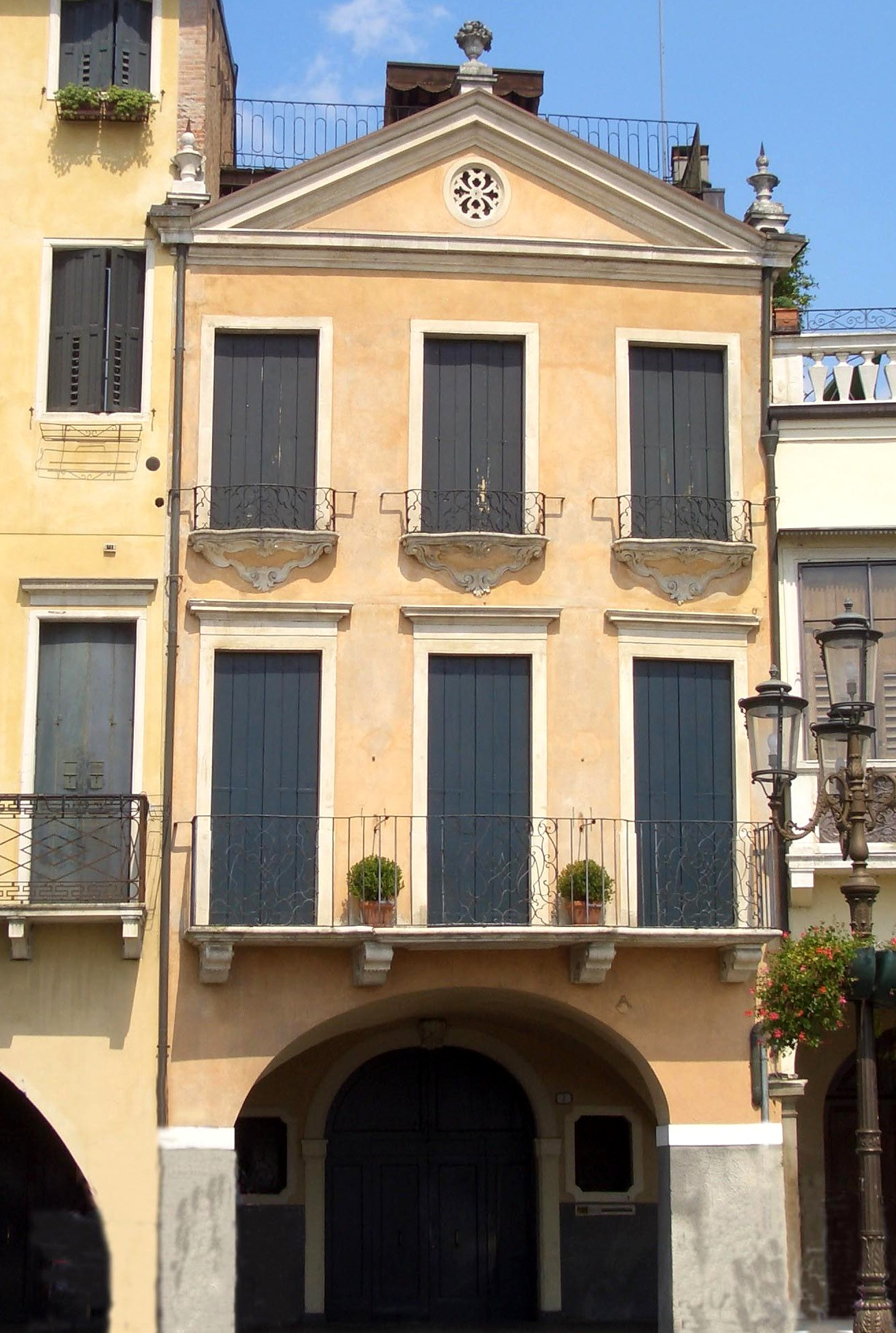 Foto scattata da me a Padova in Prato della Valle il 23.8.08 mostra il palazzetto di Angelo Querini restaurato da Domenico Cerato posto al civico 7 del Prato della Valle.